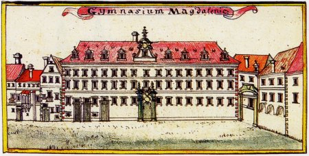 alter Druck des Maria-Magdalenen-Gymnasiums Breslau